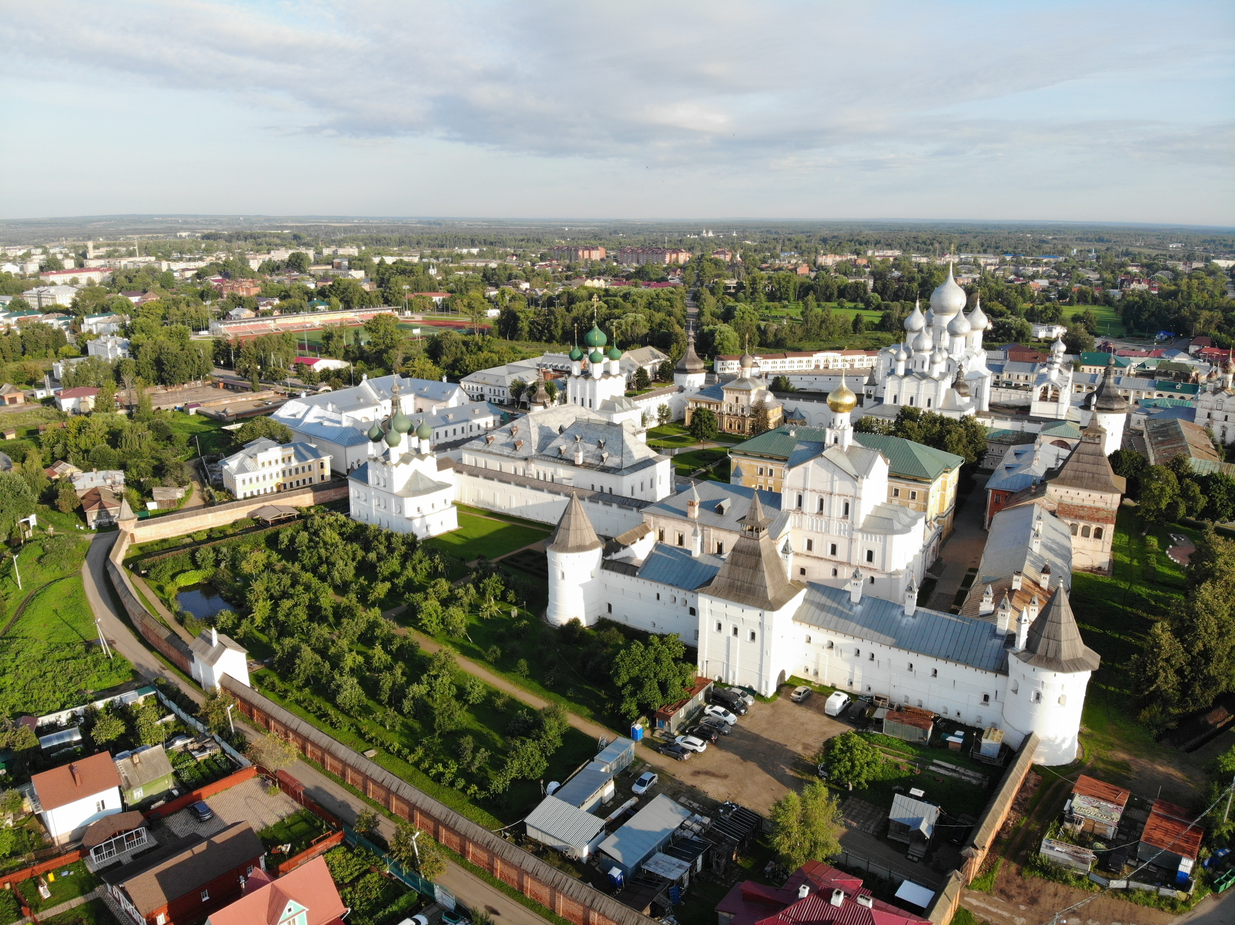 Ансамбль Ростовского Кремля: центр города, Ростов, Ярославская область